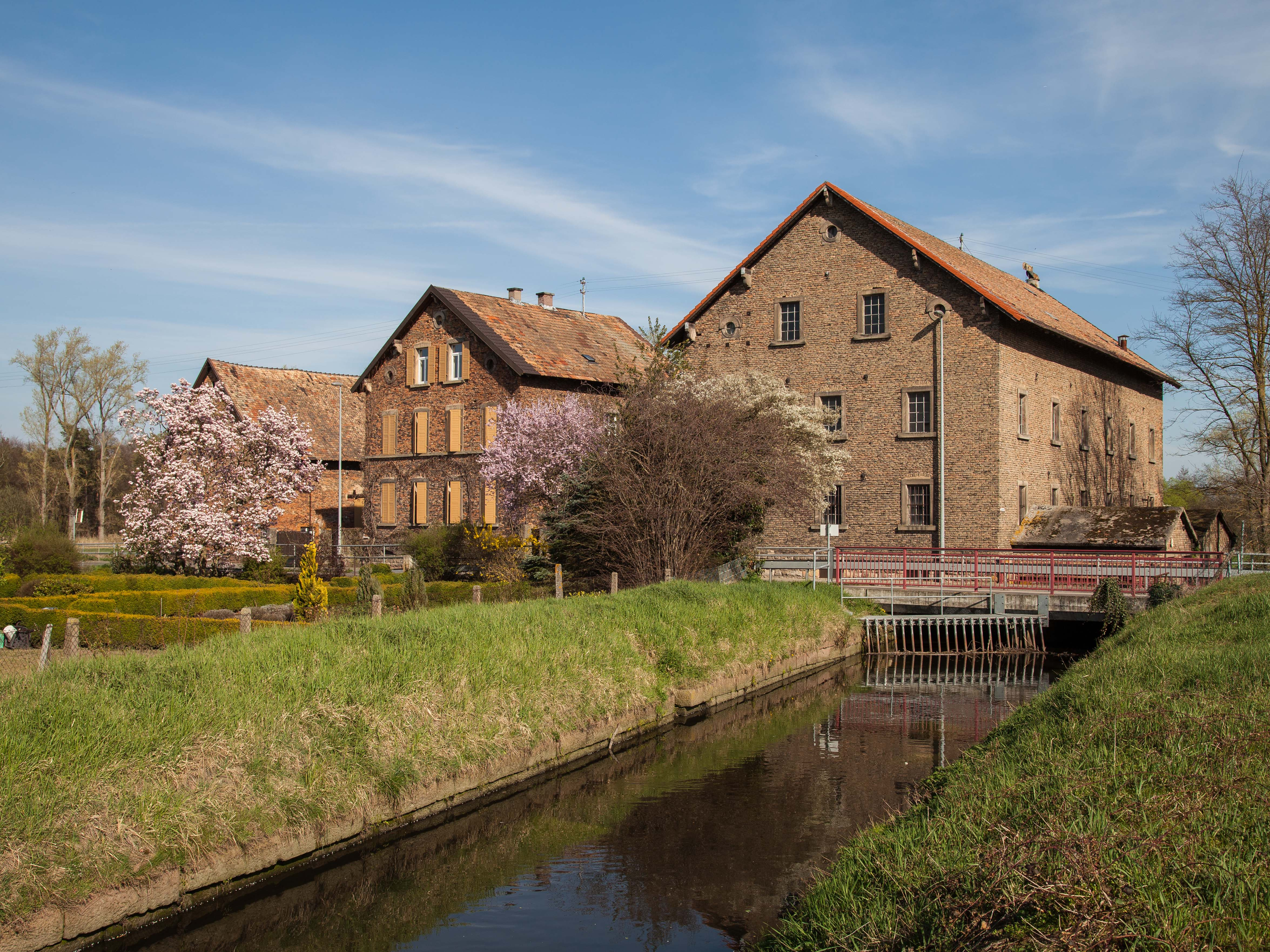 Fronmühle - mit Speyerbach und Wehr - Ansicht von Westen